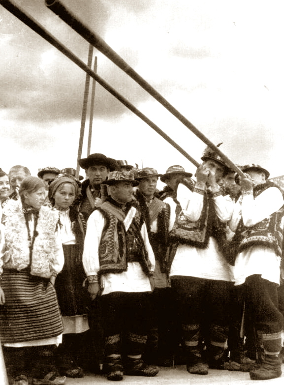 Huculscy trąbitarze, Wschodnia Malopolska, Polska 1930, autor zdjecia, A. Zieliński.